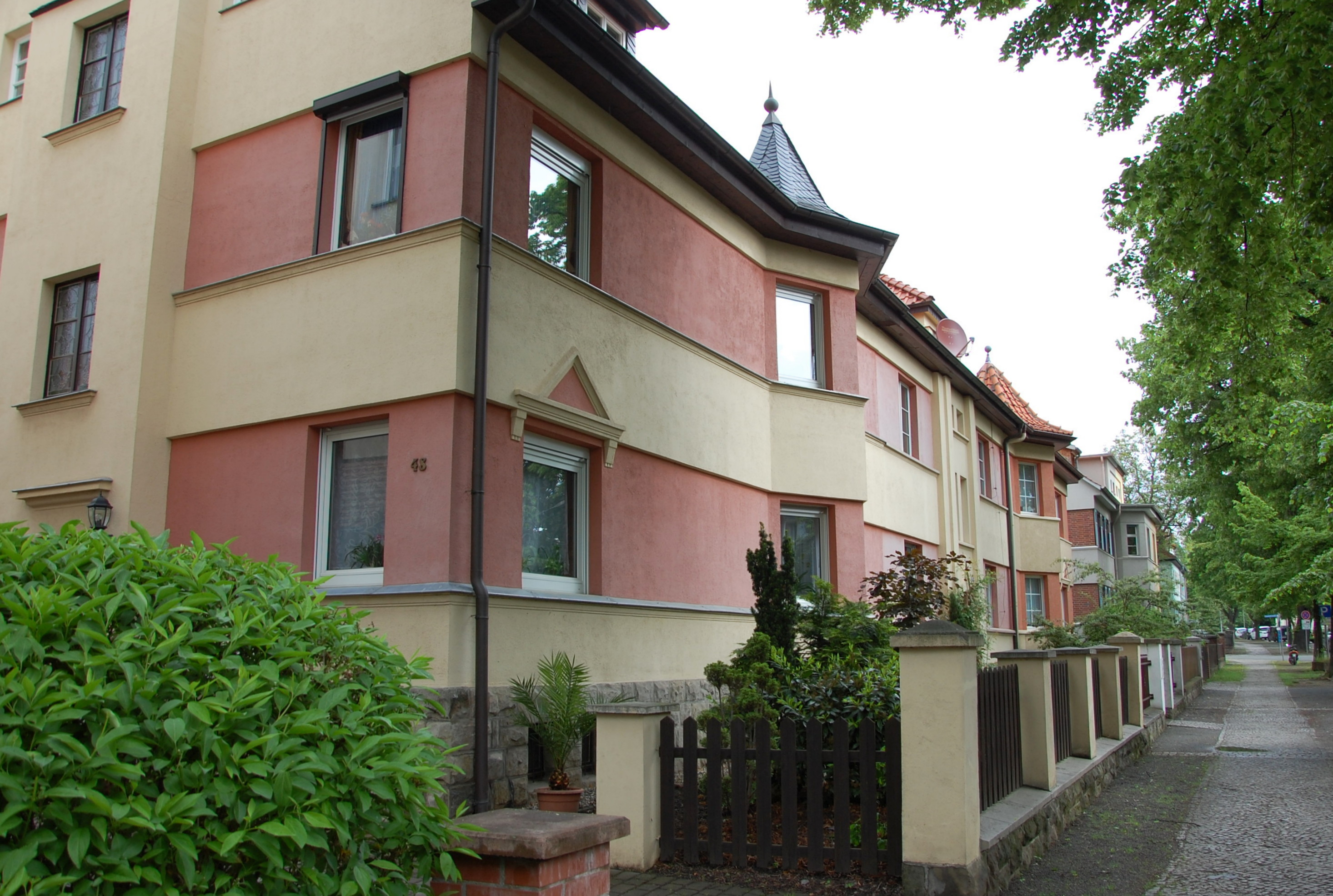 Haus Wallstraße 48-52 in Quedlinburg